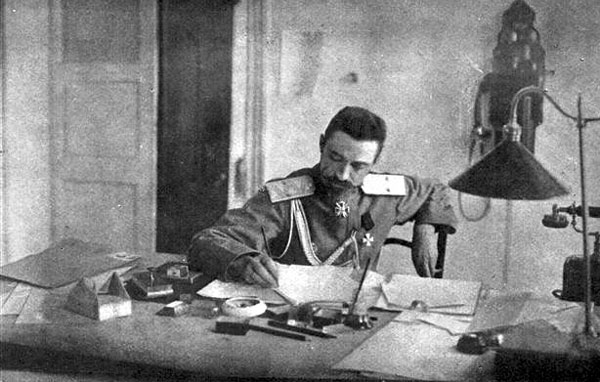 Генерал Сергей Леонидович Марков